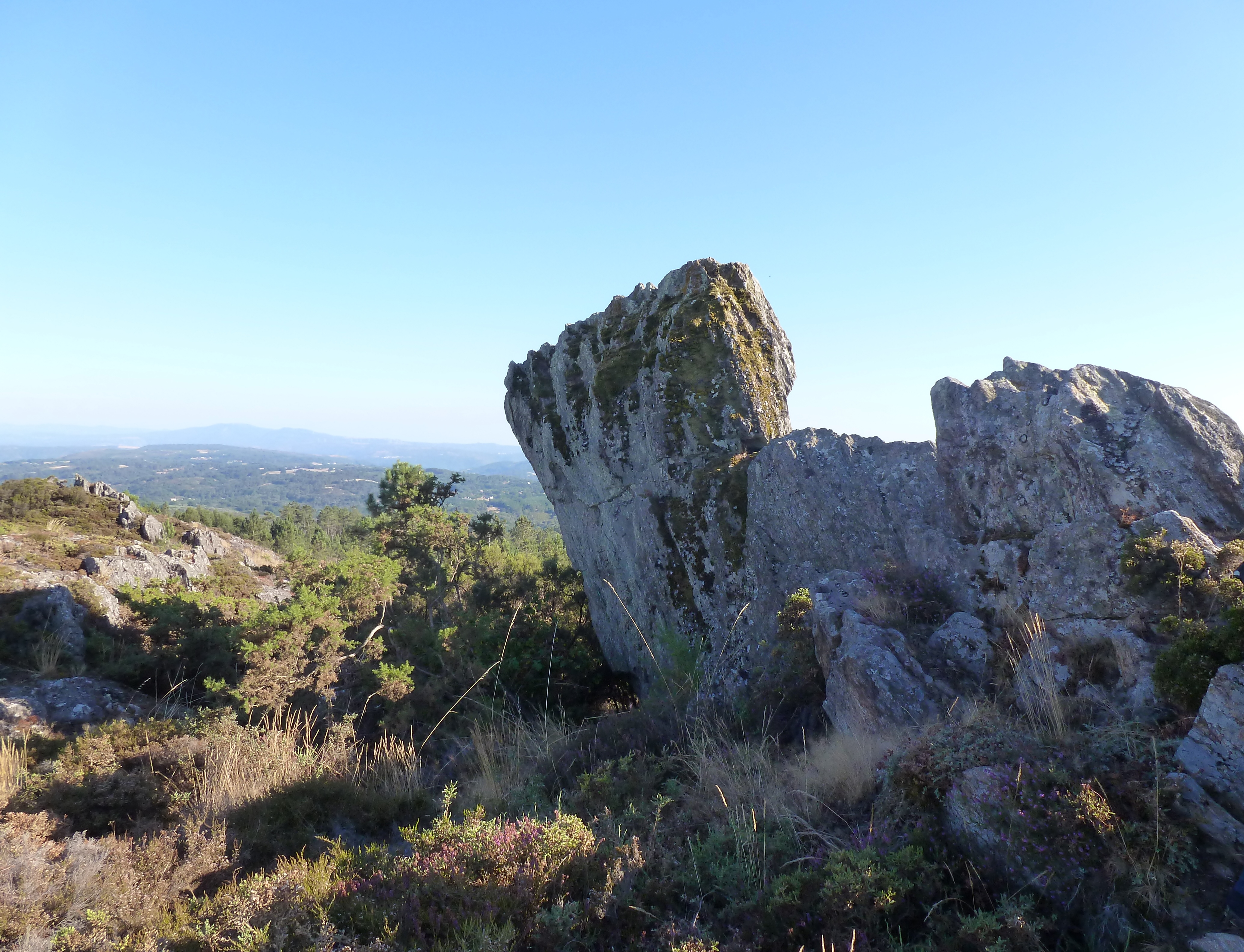 Peneda cabezuda, Monte da Serra, entre Carballedo e Chantada